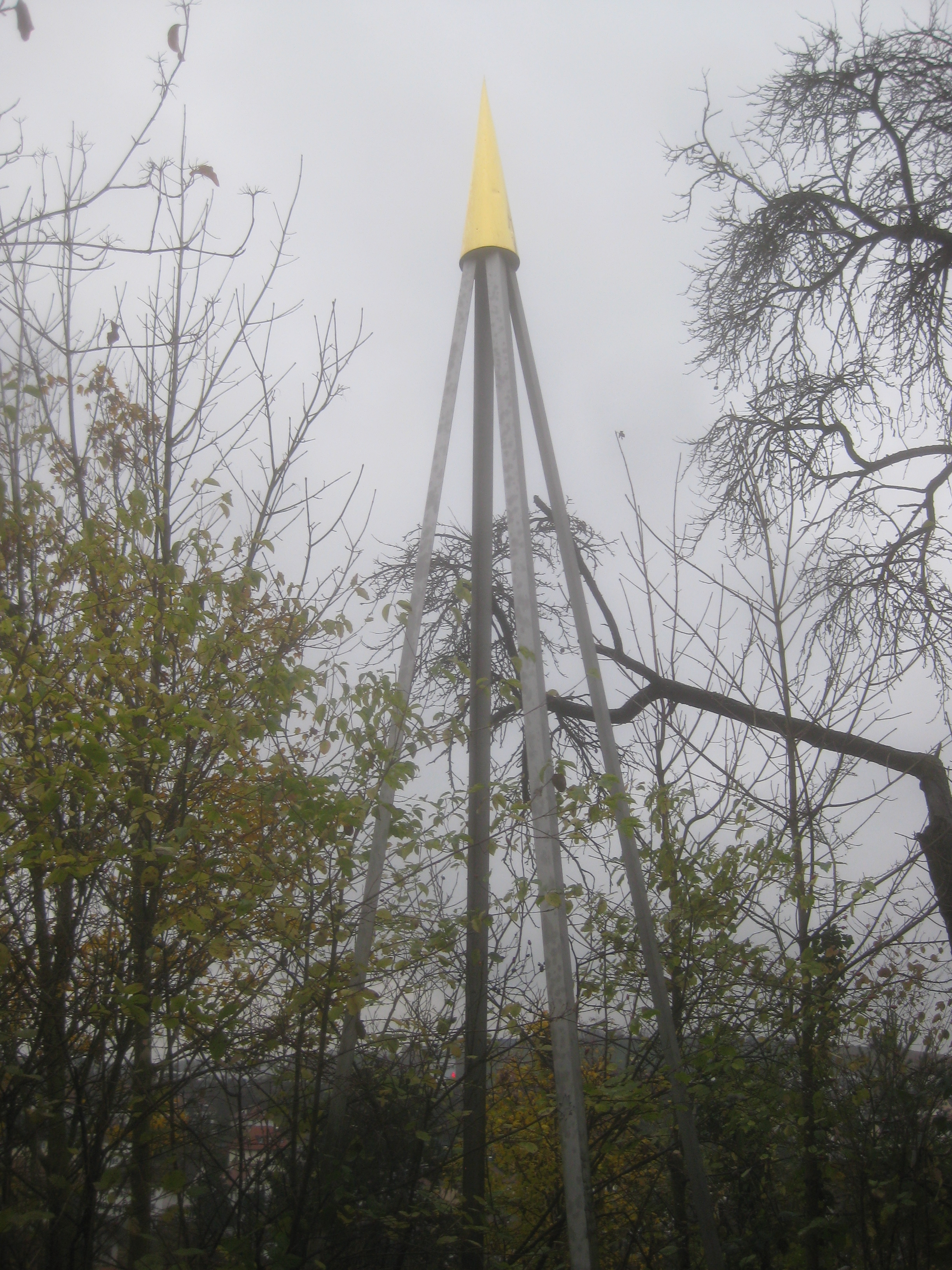 Stangenpyramide mit Lyrikstation mit einem Gedicht („Oh Heimatplanet“) von Heima Hasters auf dem Wartberggelände in Stuttgart.